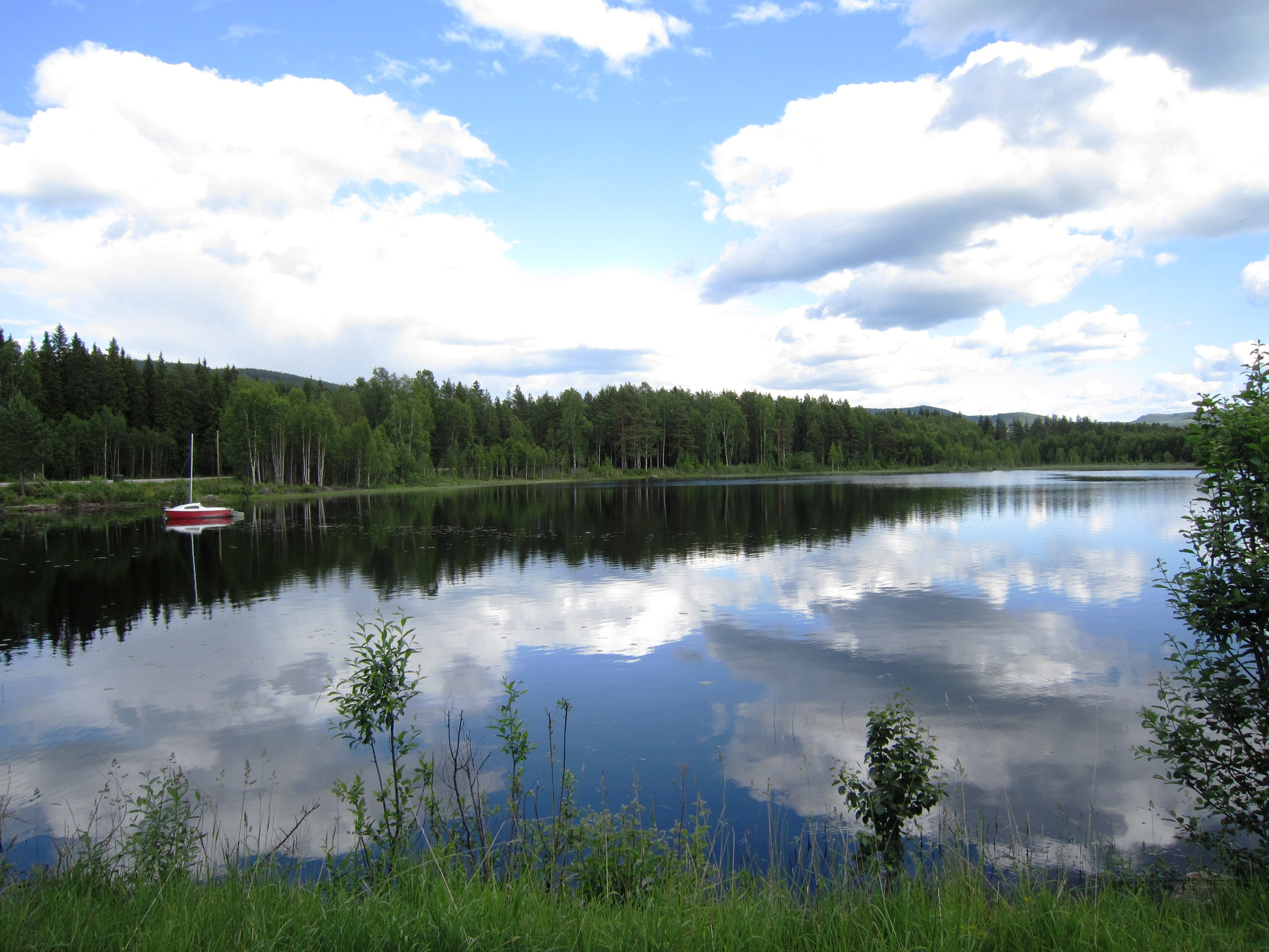 Vermunden eller Vermundsjøen, like ved Åsnes Finnskog kirke